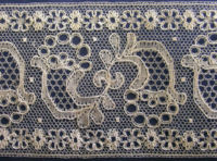 TønderKnipling(replica) トゥナーのチュールレース(レプリカ)